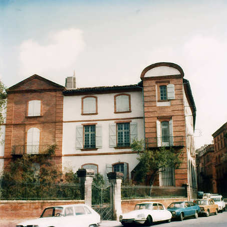 Hôtel de Scorbiac à Montauban, 32 rue Léon-de-Maleville.